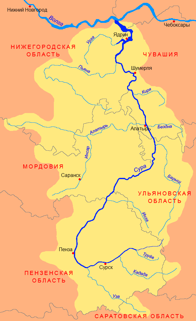 Схема бассейна реки Сура (приток Волги)